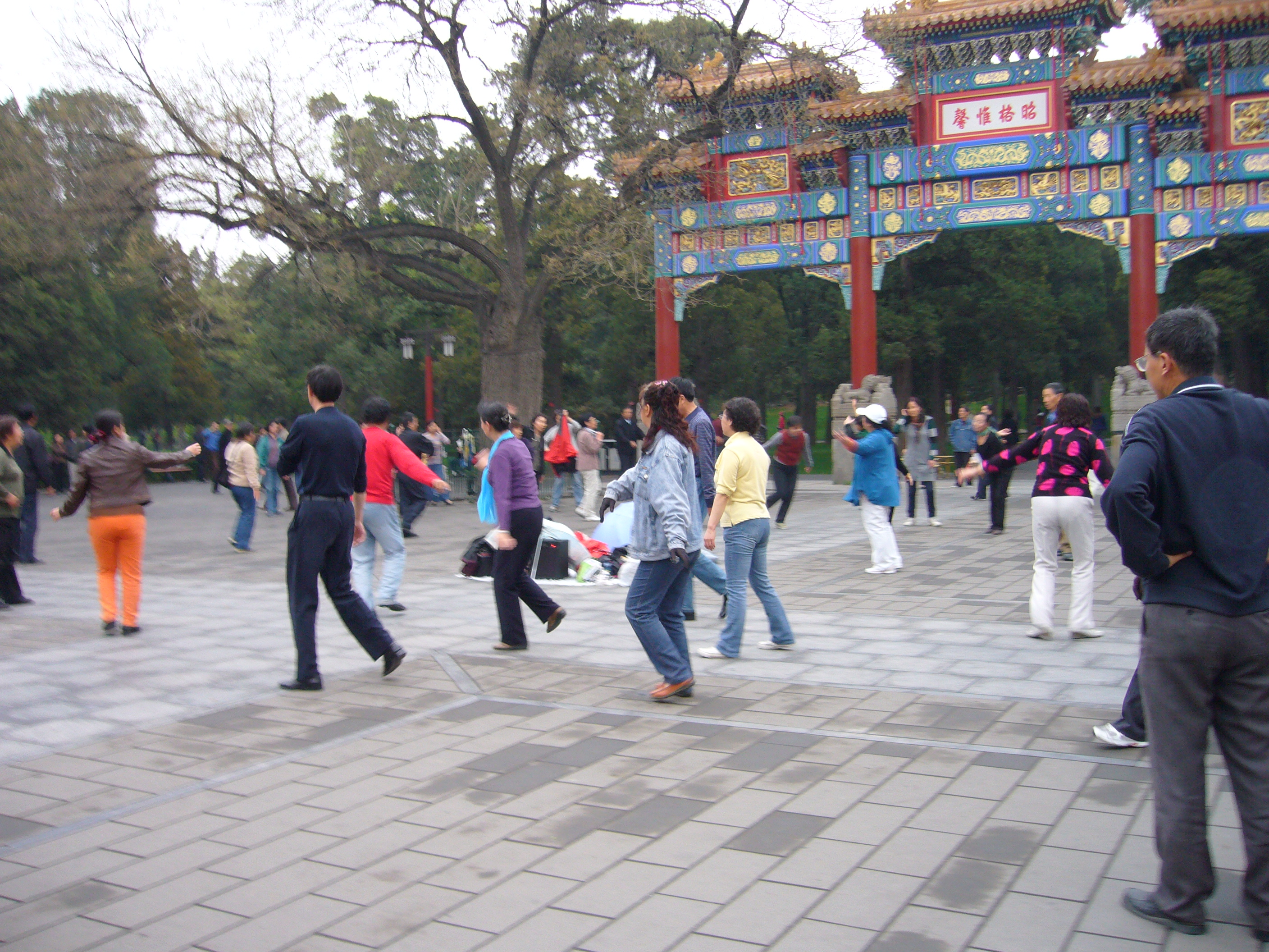 Chinese people in a park (gymnastics)